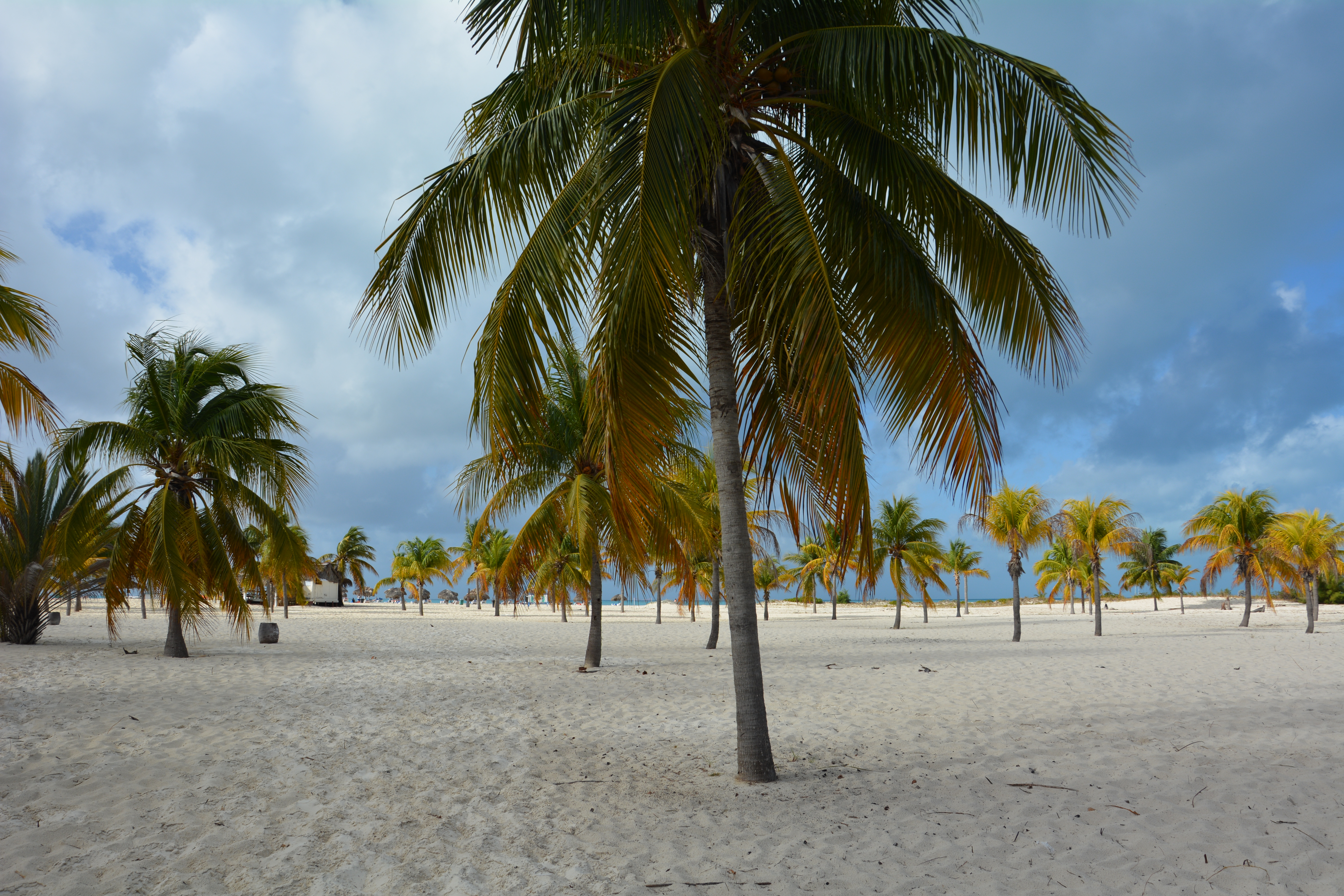 Plage Sirena sur l'île Cayo Largo à Cuba